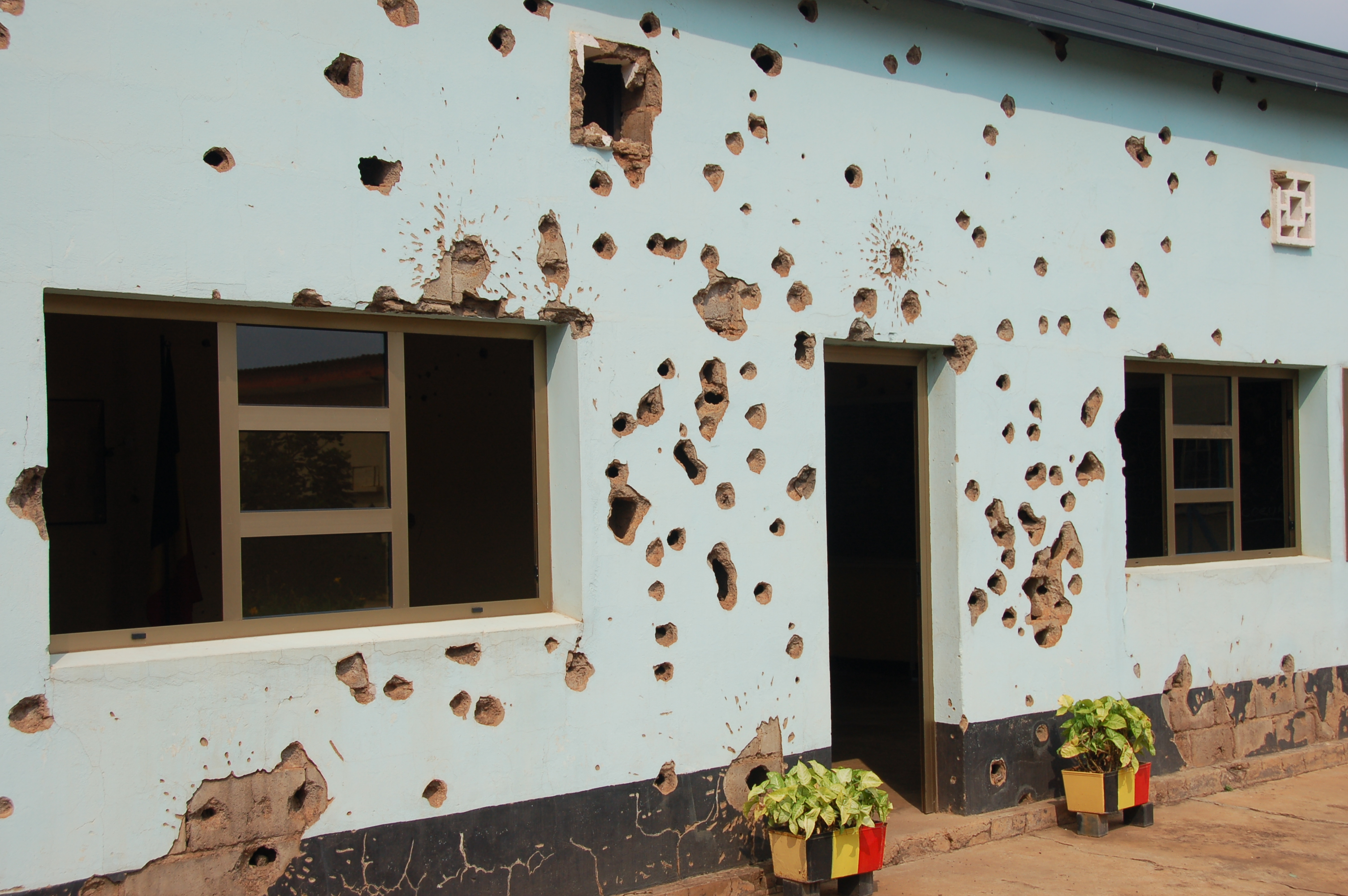 Belgian Soldier Memorial in Kigali, Rwanda, where ten Belgian soldiers were killed in 1994